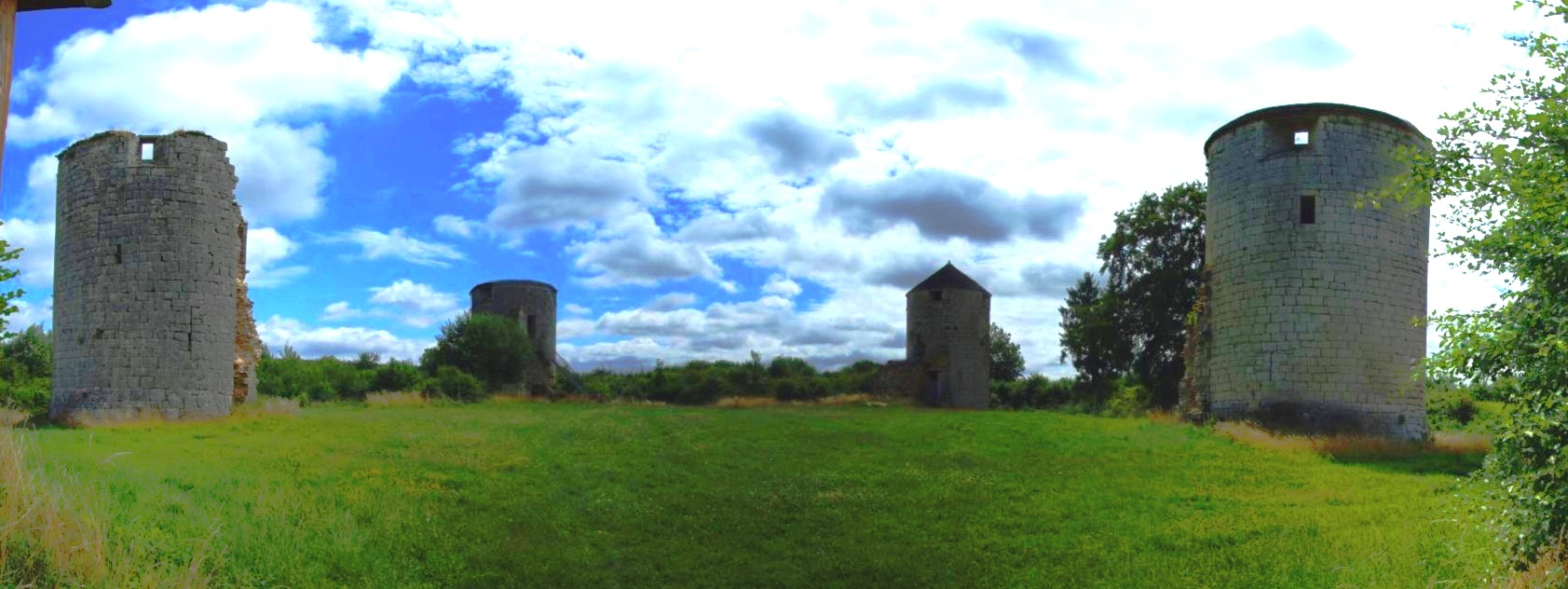 Château de Villaines-en-Duesmois, Côte-d'Or, Bourgogne, FRANCE